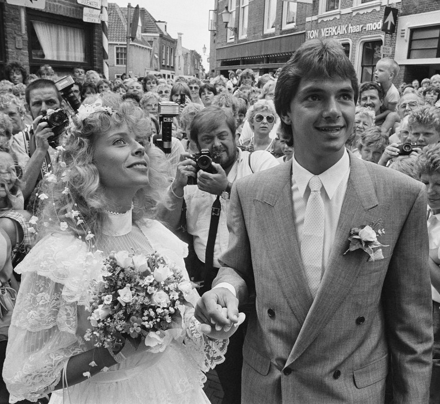 Hein Vergeer getrouwd met Carolien Kruisinga in Haastrecht